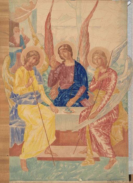 Эскиз для витража в Троицком соборе города Сумы